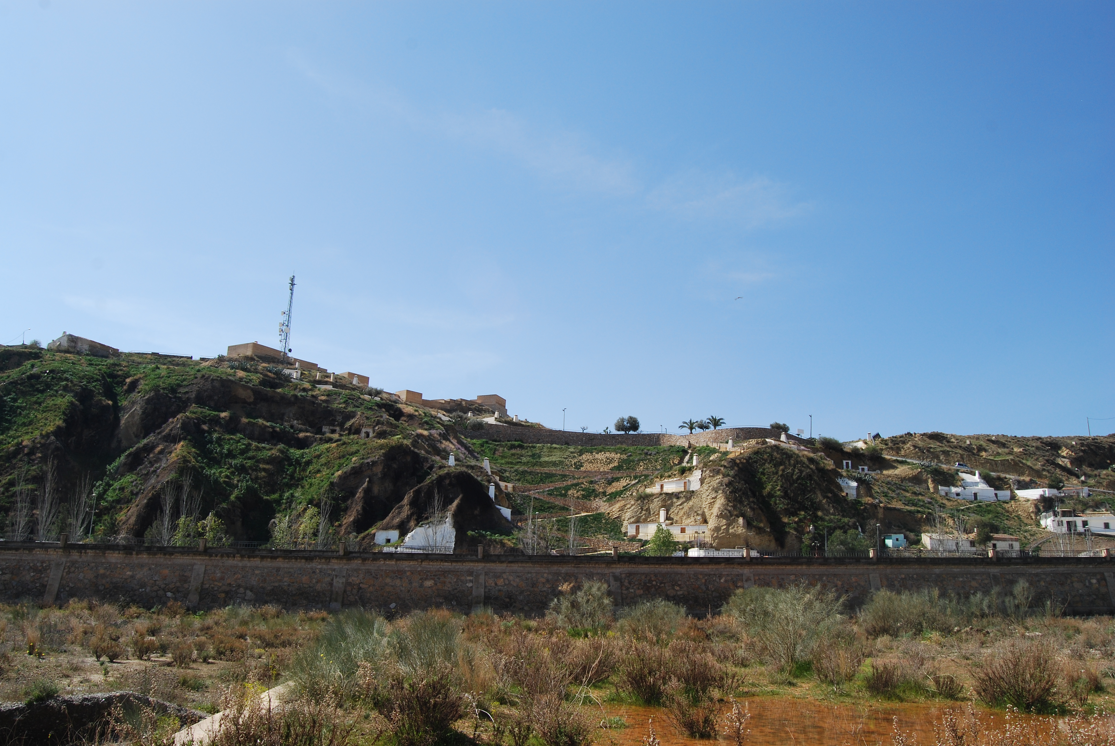 Vista del Castillo de Nogalte desde la rambla